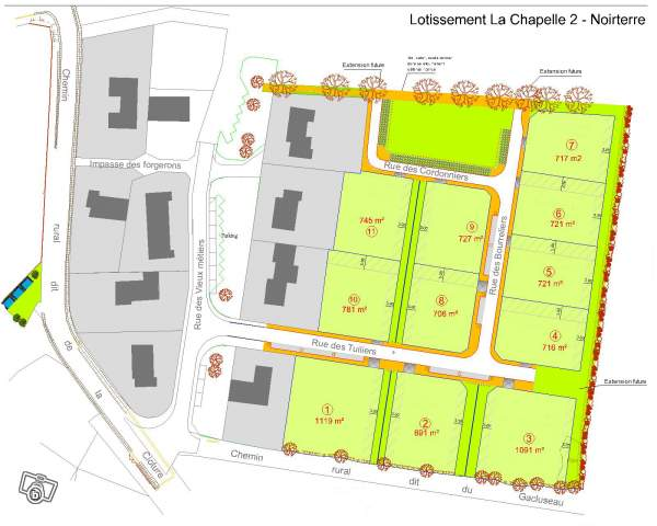 Plan du lotissement Le Champ de la Chepelle II à Noirterre (Deux-Sèvres - France)